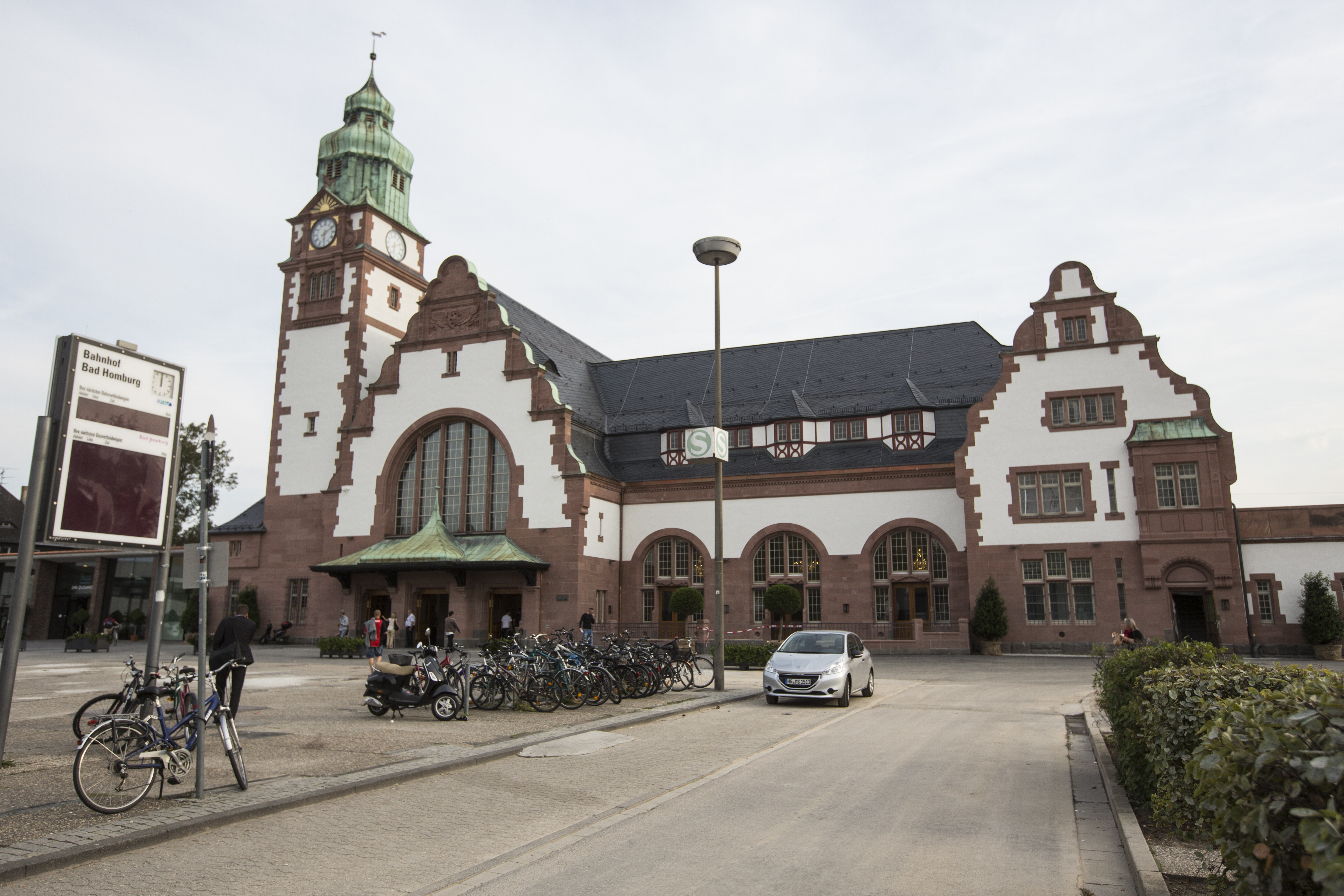 Das Hauptgebäude des Bahnhofs Bad Homburg.